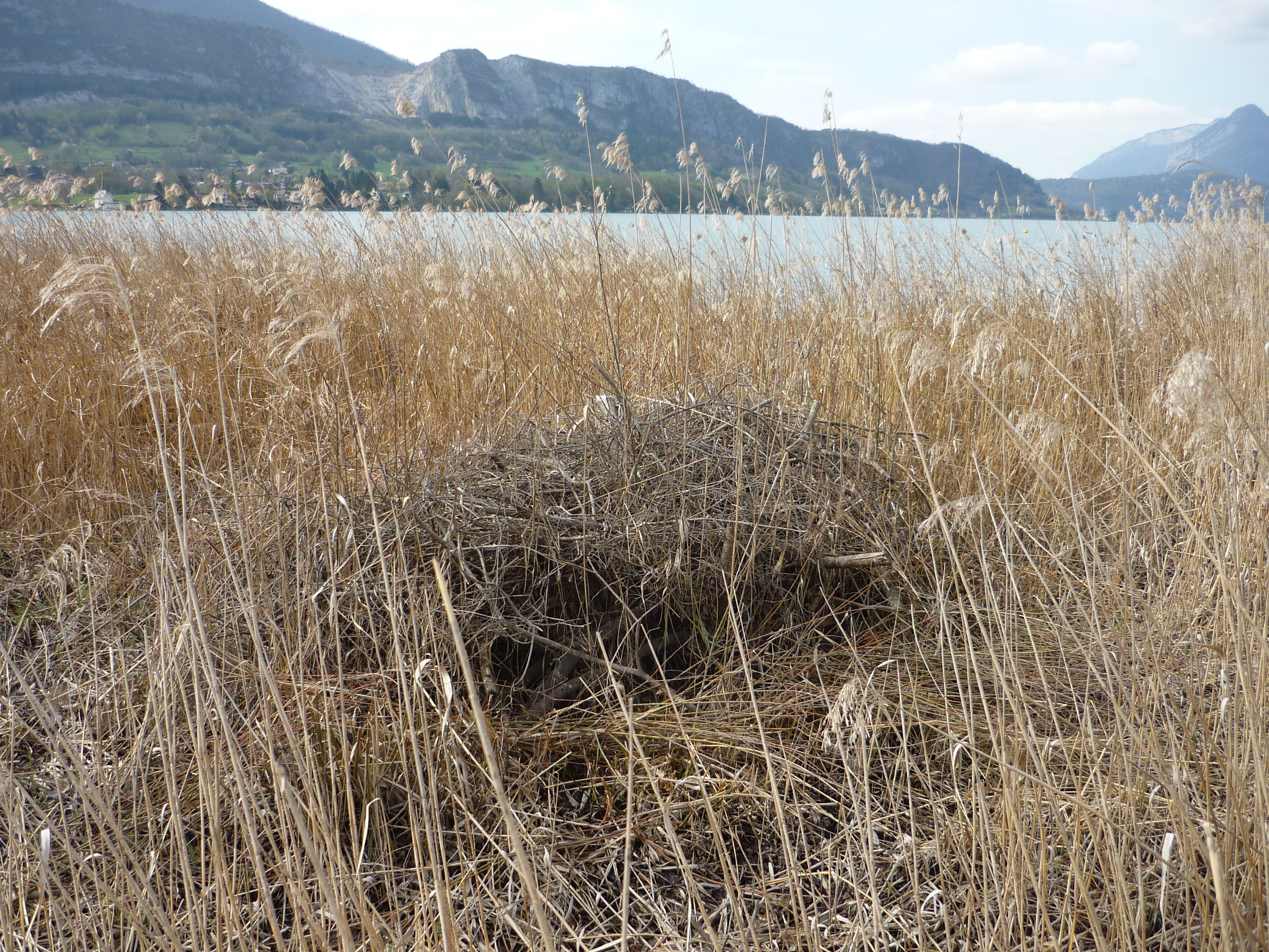 Réserve naturelle du Bout-du-Lac, Doussard, Haute-Savoie, France